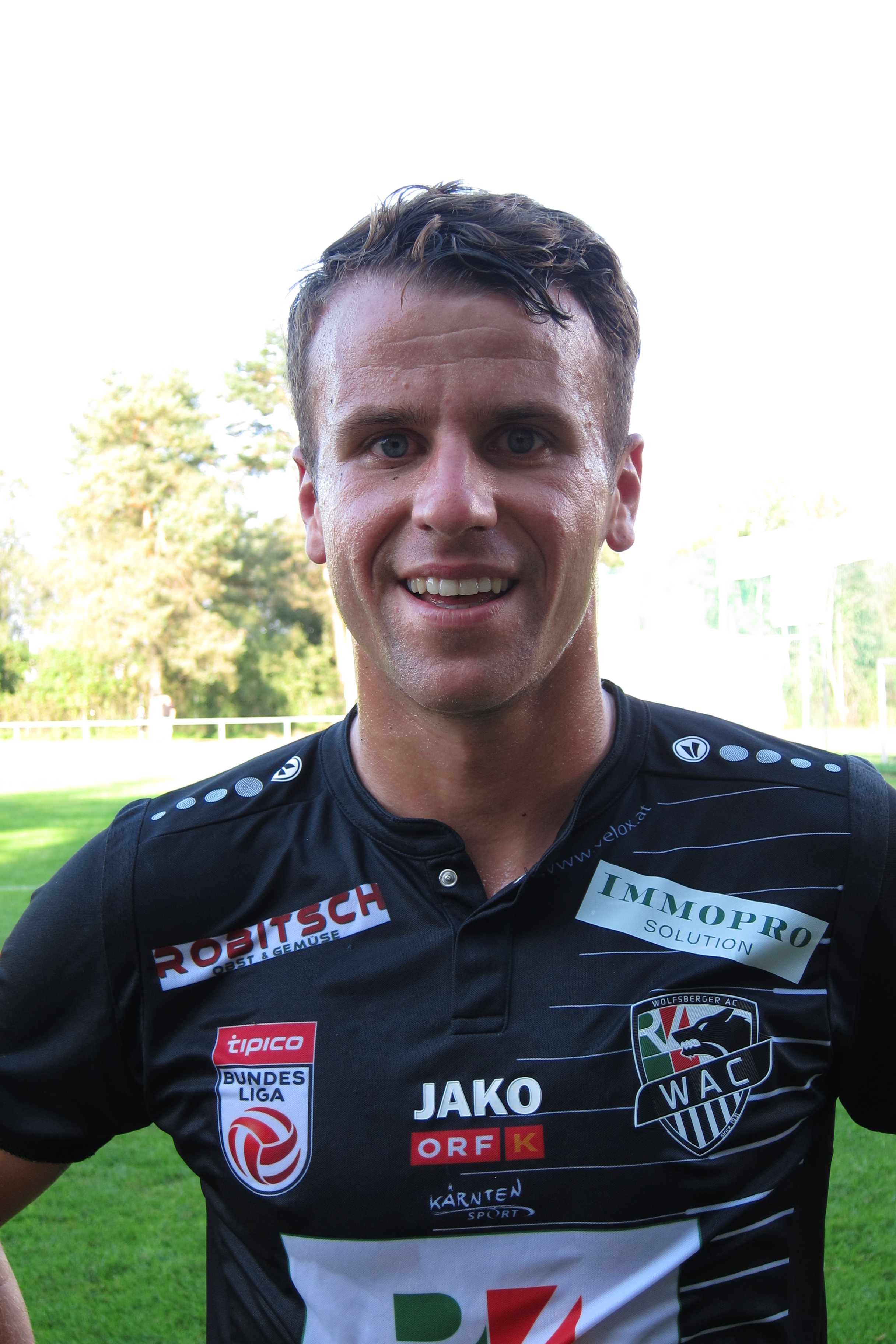 Lukas Schmitz (WAC)